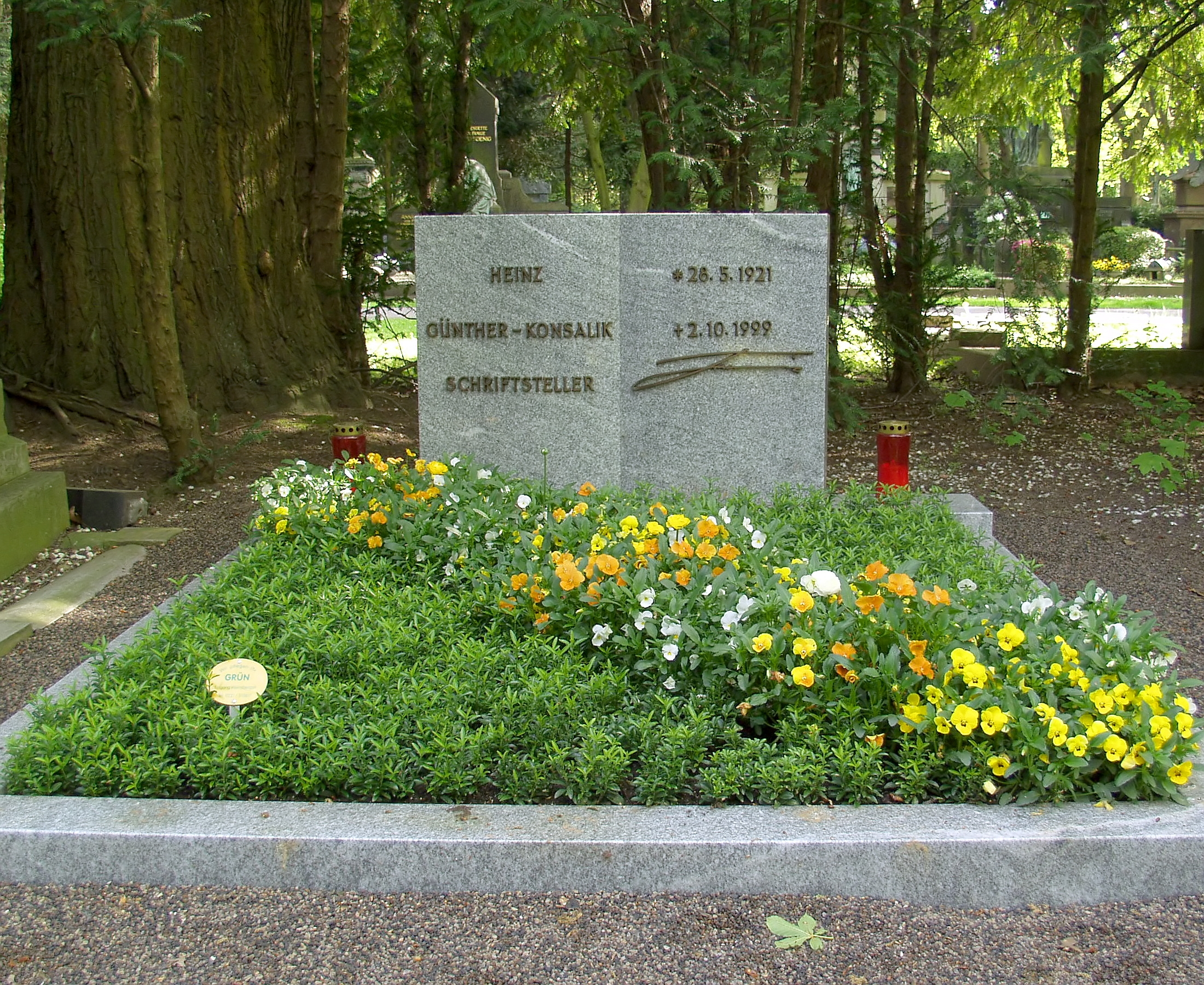 Grabstätte von Heinz Günther Konsalik auf dem Melaten-Friedhof in Köln